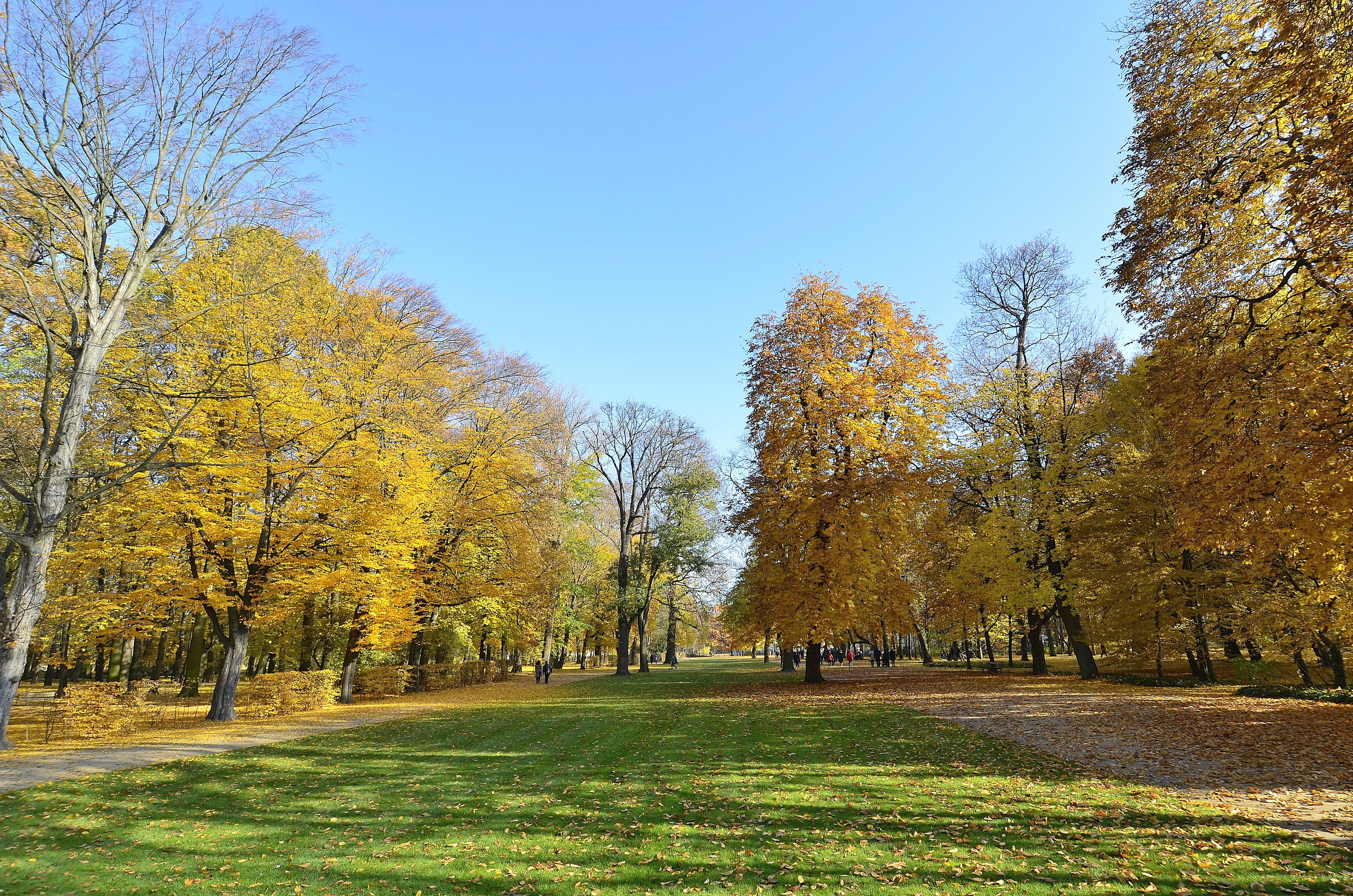 Promenda Królewska w Łazienkach Królewskich w Warszawie